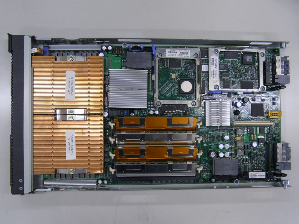 IBM_BladeCenter_HS21_8853_